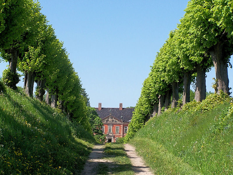 Blick durch die historische Allee auf Schloss Bothmer